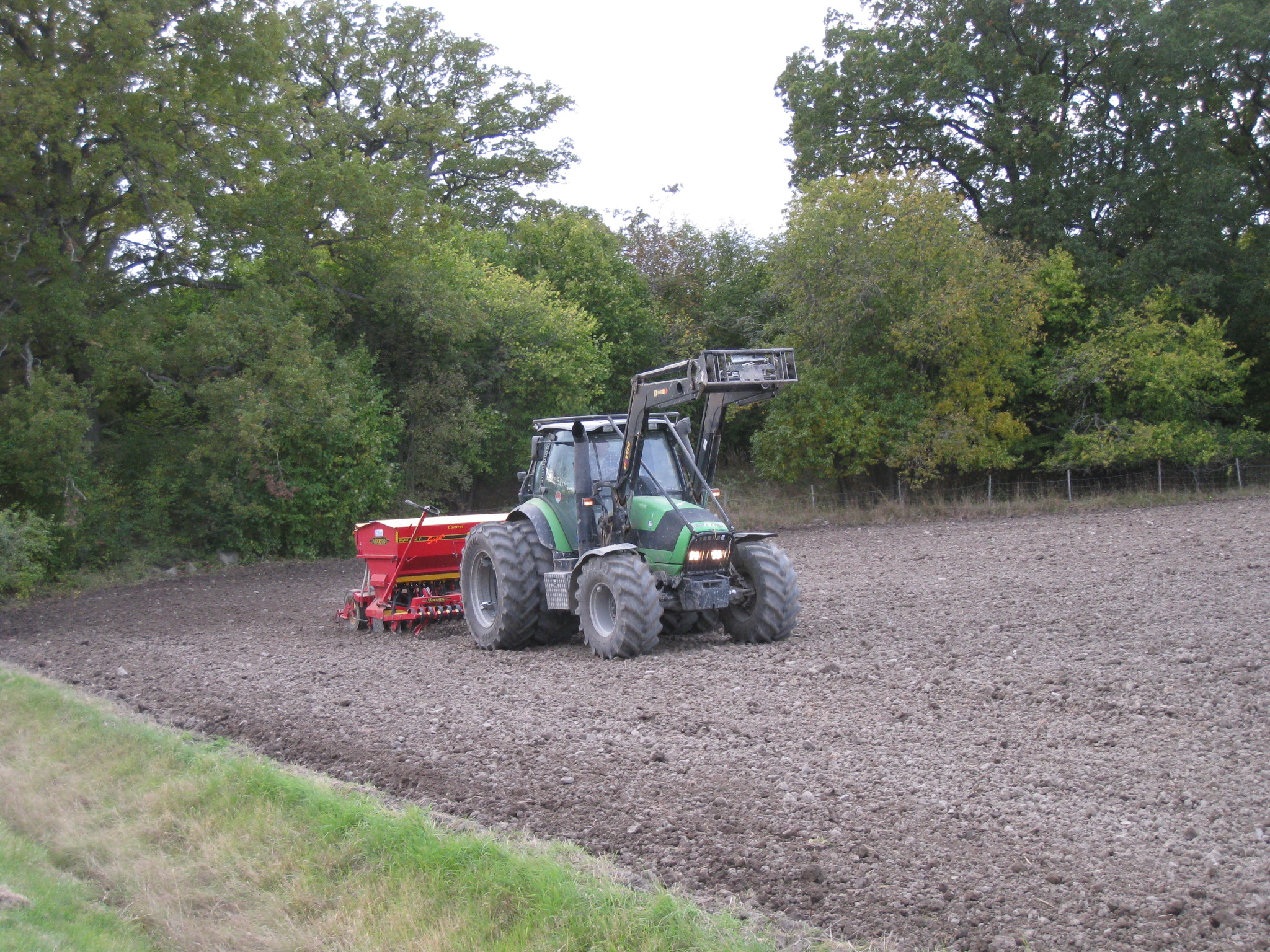 Högby läsidesmorän från öster. Läsidesmoränen ligger på en långsträckt kulle i åkern i vinkeln mellan Mälarvägen och Råstensvägen i Viksjö, Järfälla.